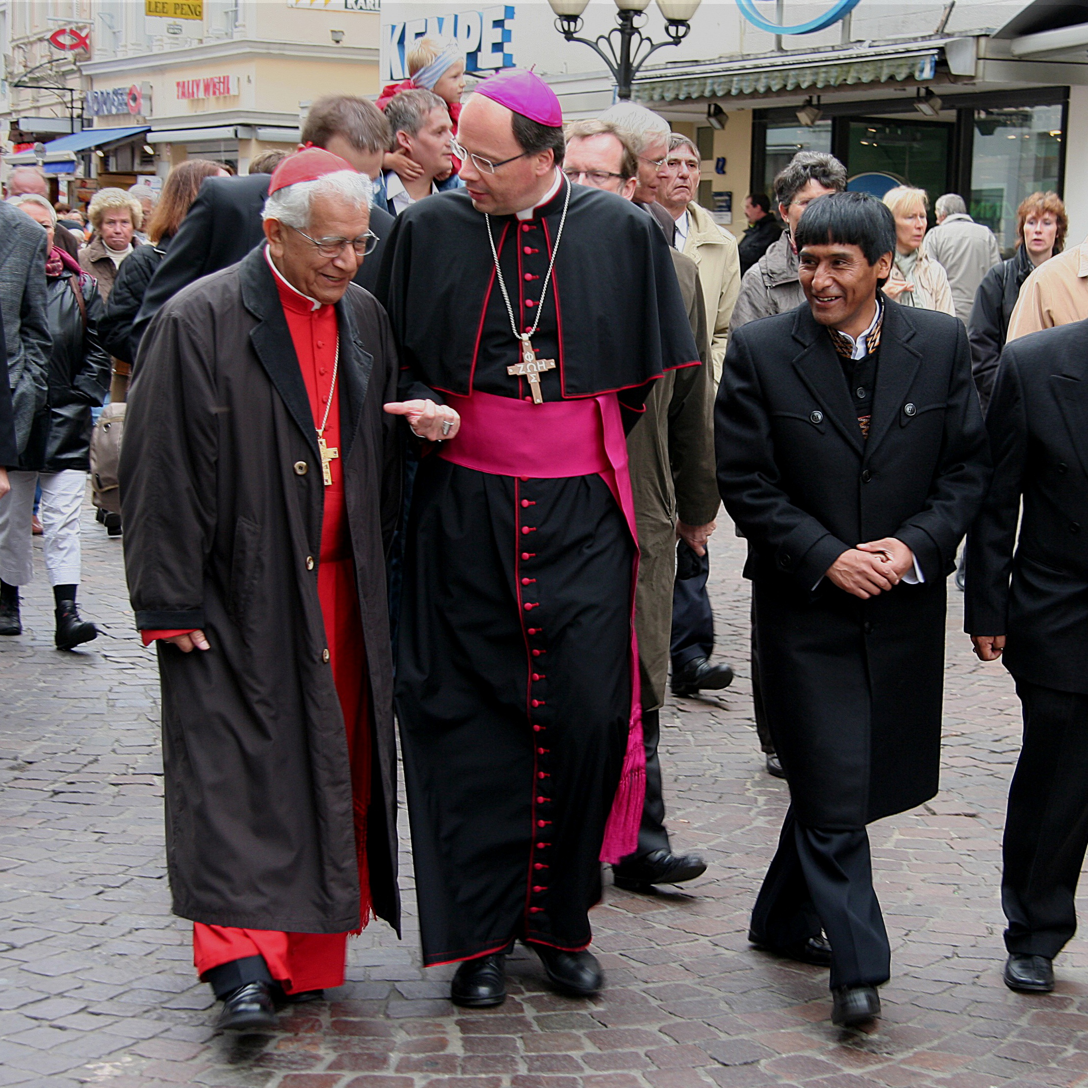 Julio Kardinal Terrazas (links) und Diözesanbischof Stephan Ackermann anlässlich der Feier 50 Jahre Bolivienpartnerschaft in einem Umzug durch die Straßen von Trier